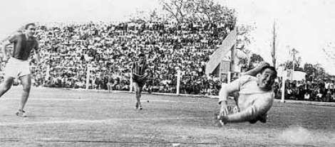 Rogelio Mallea atajando para el Club Atlético San Martín (San Juan)